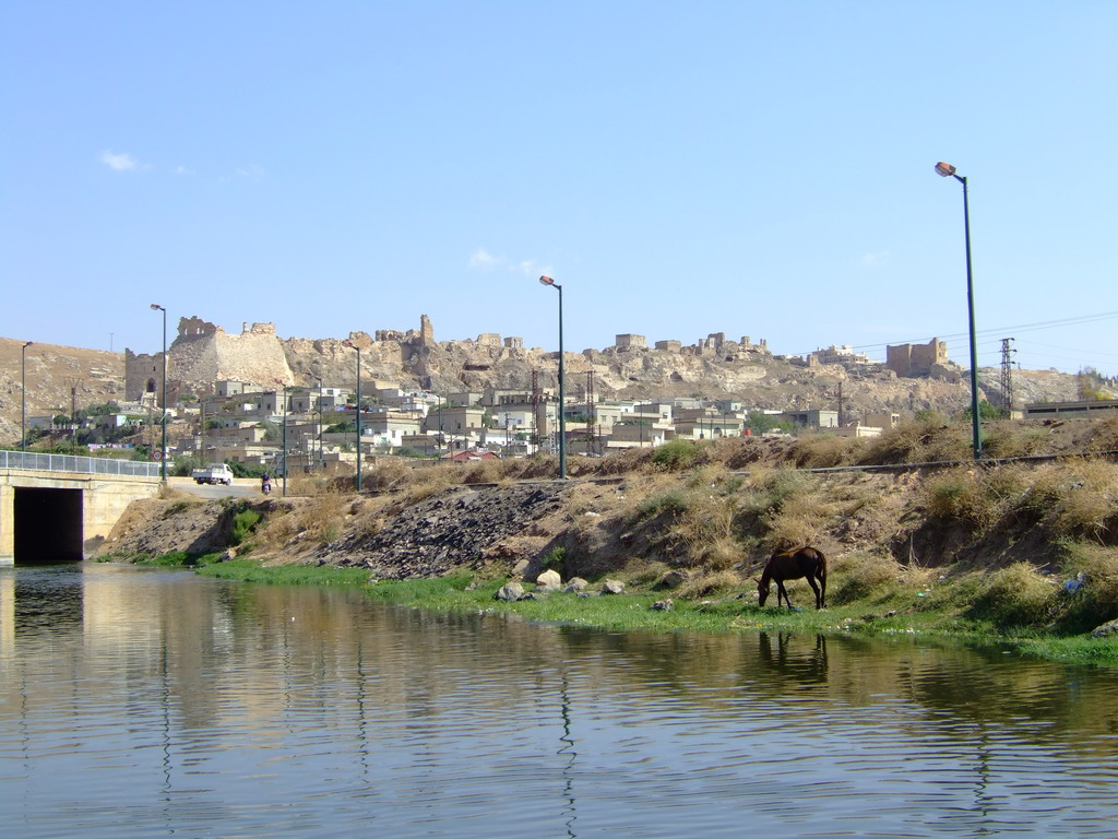 Fatta in Siria - Agosto 2007